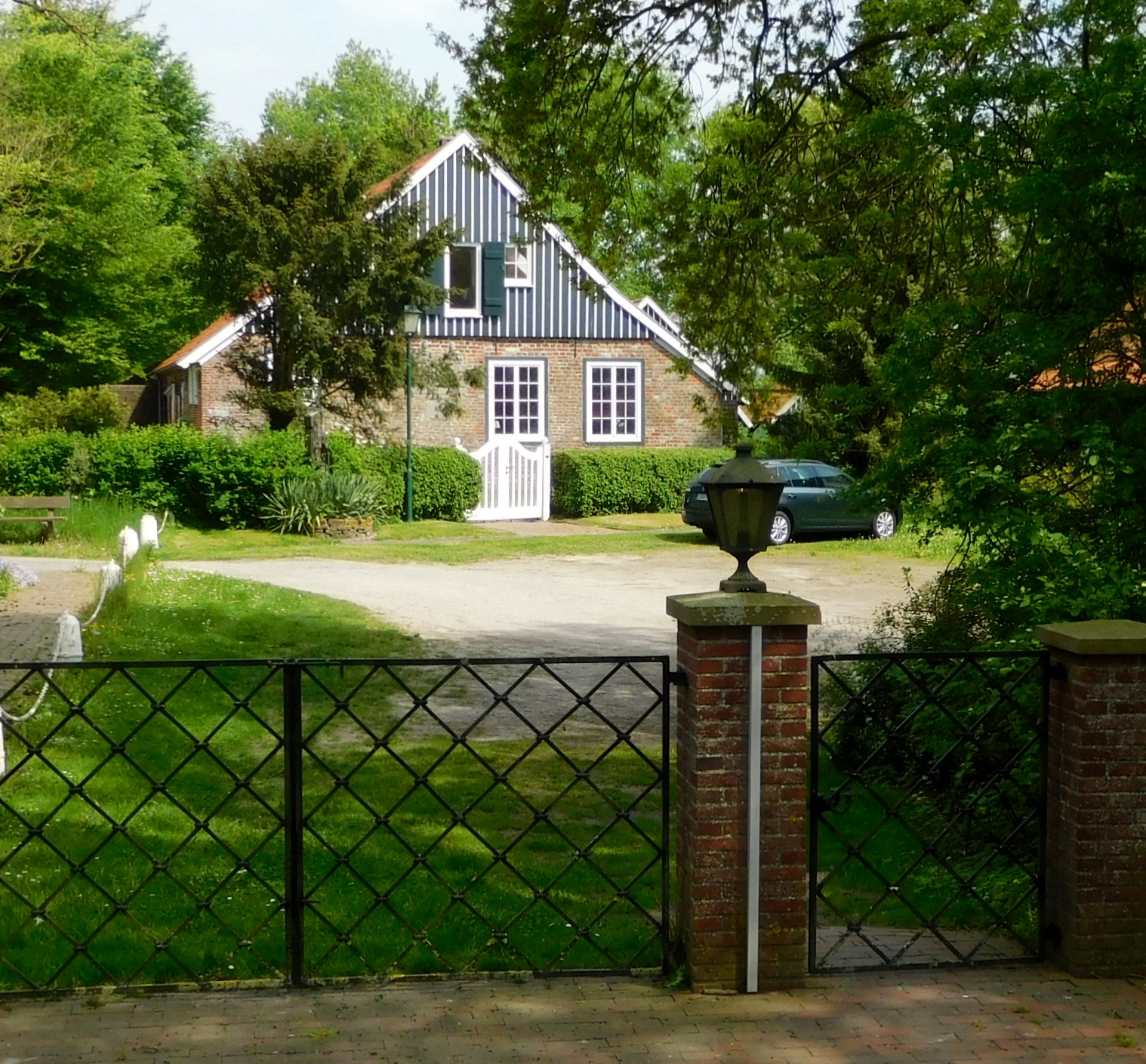 Ehemaliges Pastorenhaus (bis 1904) der Kirchengemeinde Wüppels